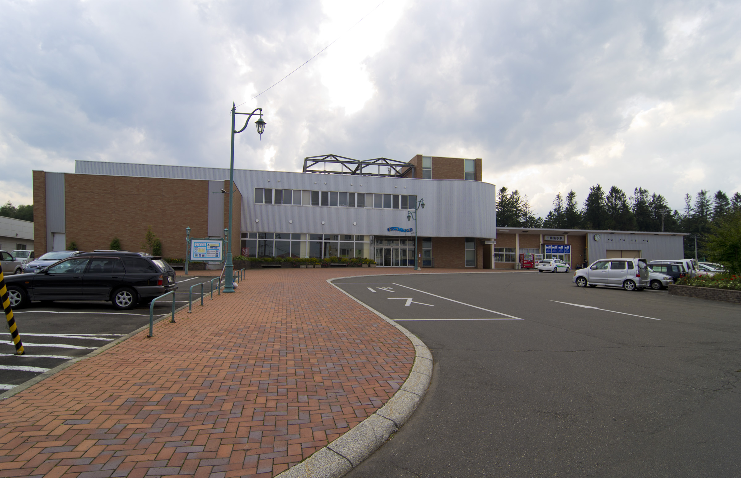 北海道旅客鉄道株式会社根室本線十勝清水駅駅前